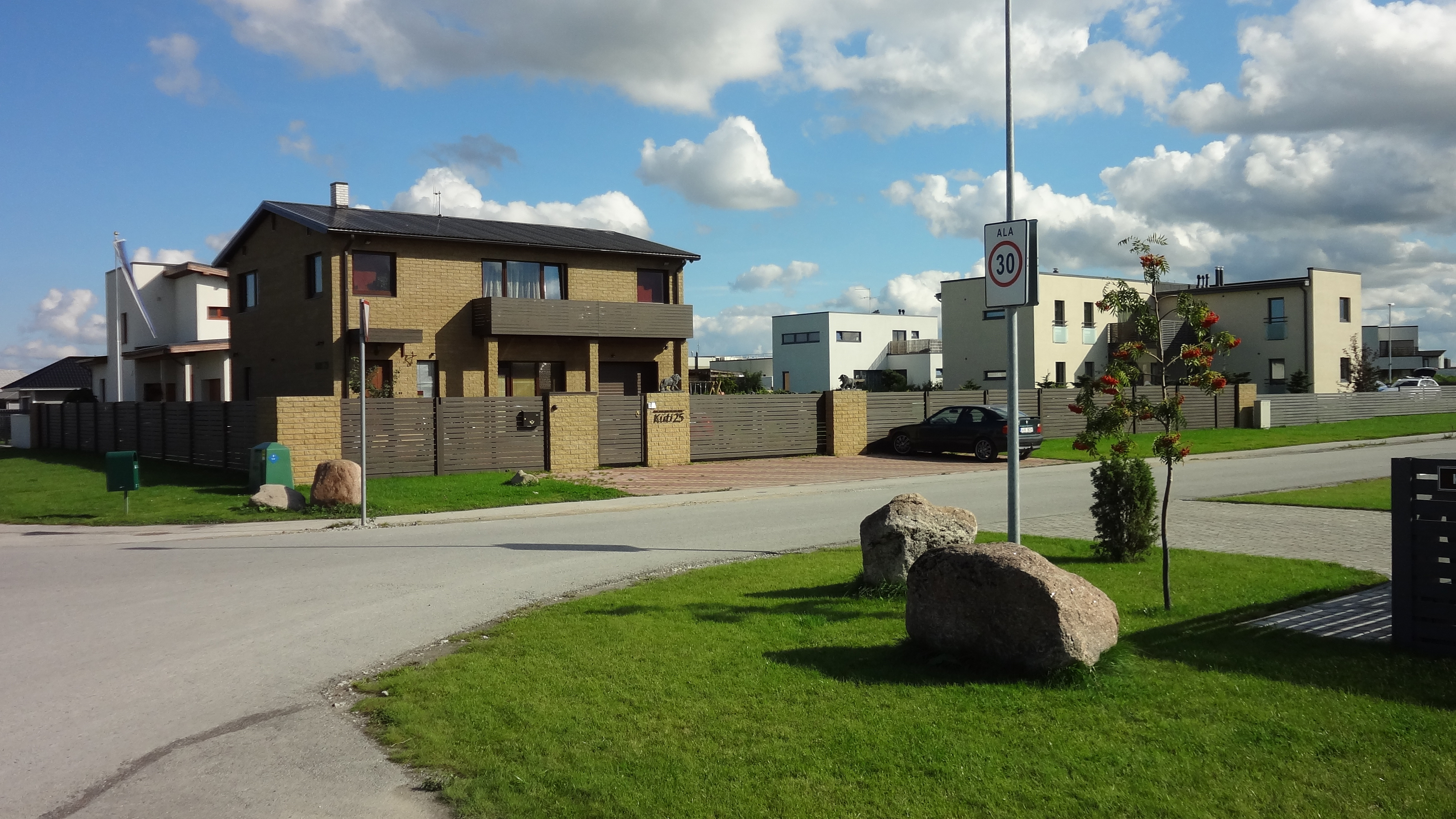 Salu tee